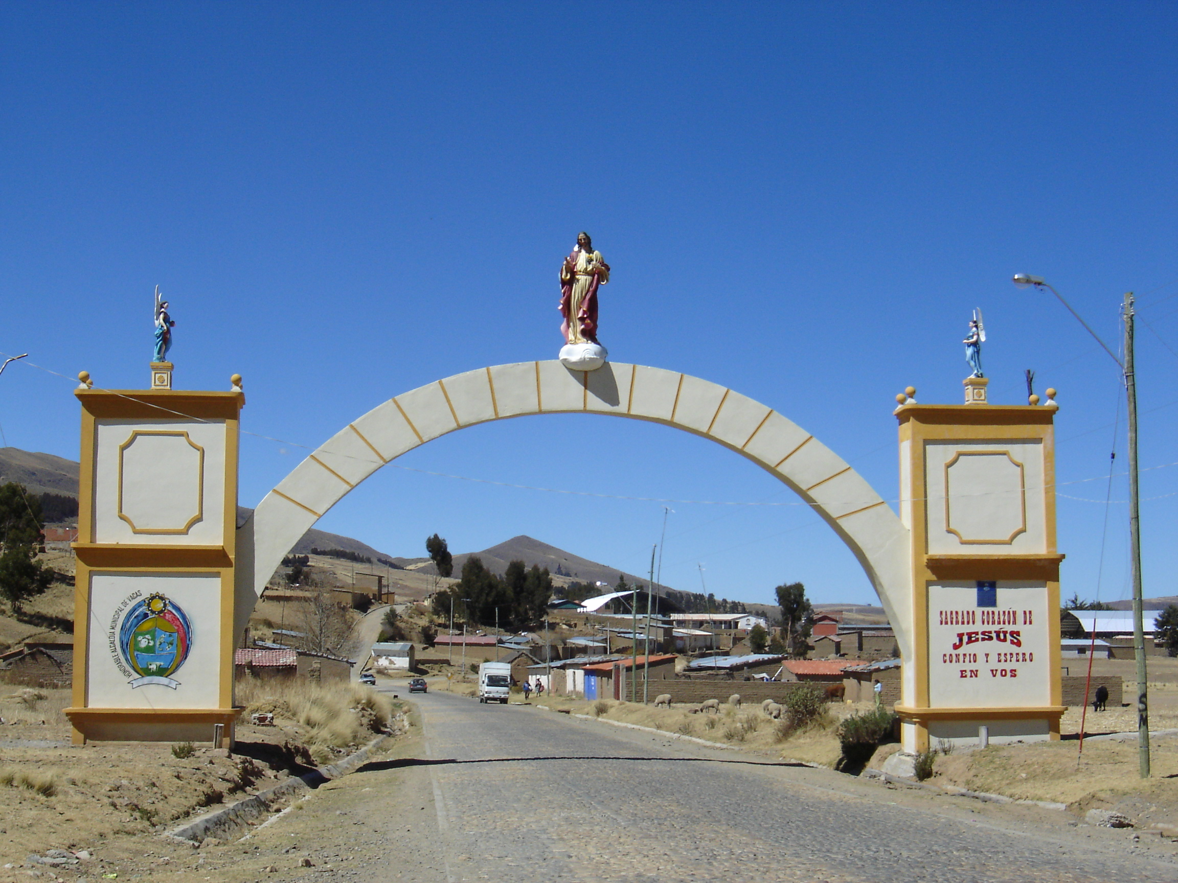 Arco de bienvenida y despedida a la llegada y salida de la población de Vacas, con dos imágenes al centro: el Sagrado Corazón de Jesús y Sagrado Corazón de María, resguardados por dos ángeles a ambos lados. Obra realizada entre el año 2008 y 2009 con el esfuerzo y apoyo de las "Hermanas Misioneras Catequistas del Sagrado Corazón". Runa Simi: Chukupunku allinjamusqa kacharpayapaq ima, Wak'as llaqtaman chayaypi lluqsimuypi ima, chawpinpi iskay lantikunawan: Sagrado Corazón de Jesús Sagrado Corazón de Maríawan ima, iskay angelkunawan jallch'asqa kantusninpi. Kay ruway ruwasqa karqa 2008 watamanta 2009 watakama, "Hermanas Misioneras Catequistas del Sagrado Corazónpa" kallpachayninkuwan yanapayninkuwan ima.